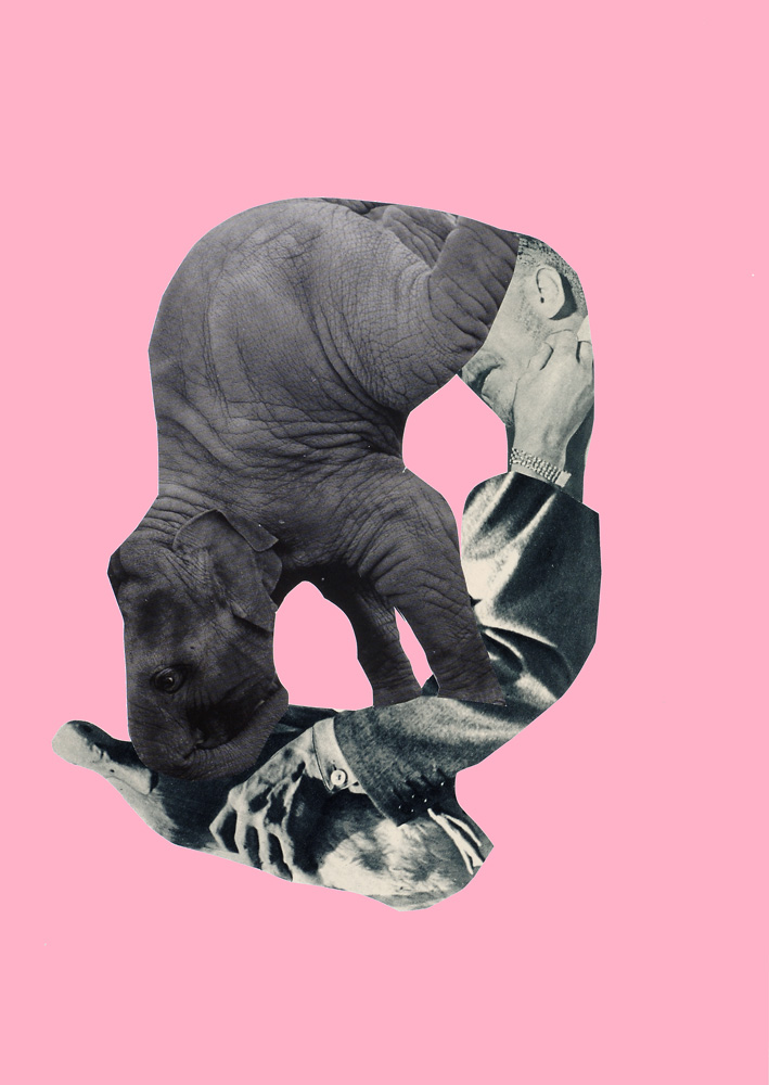 Less, 2009